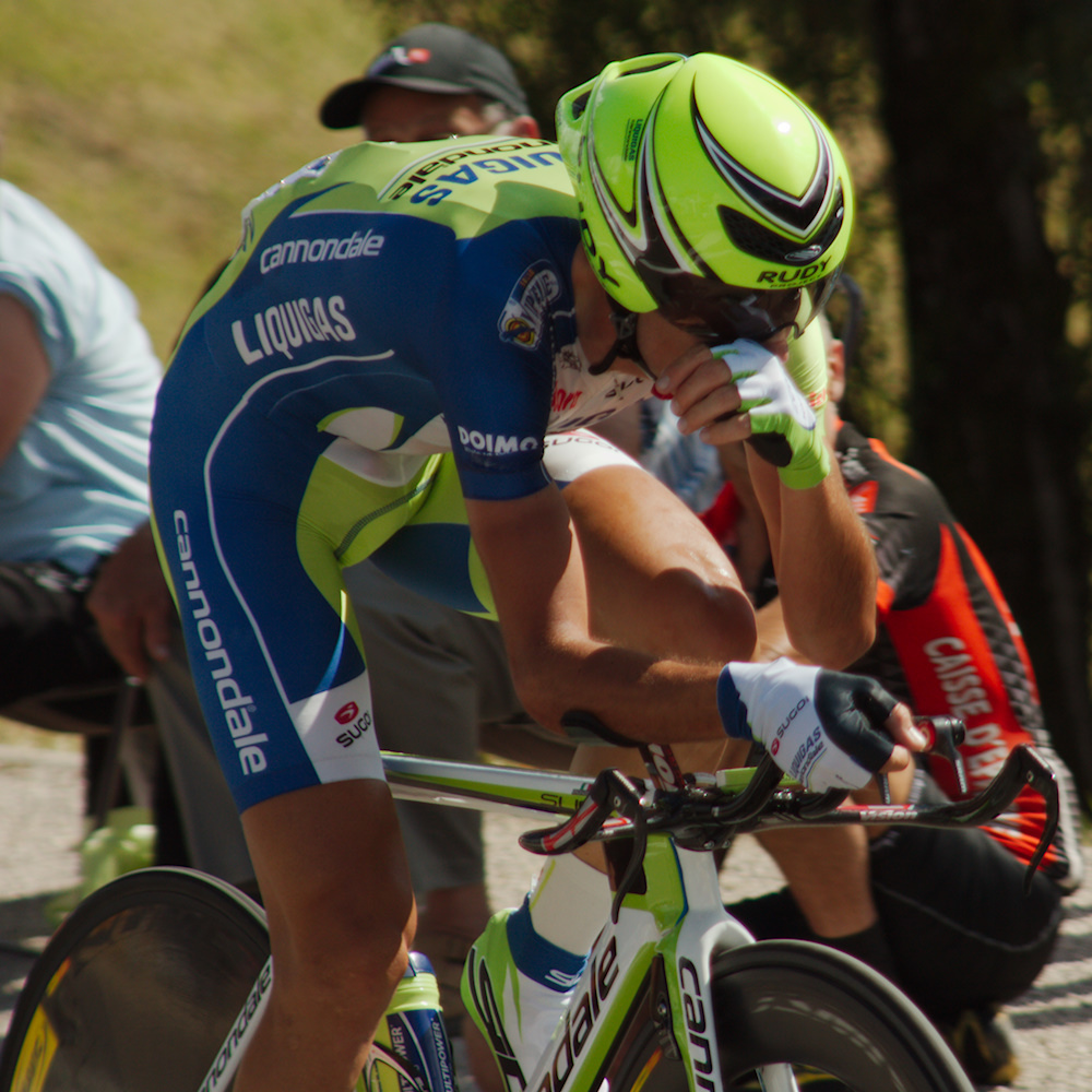 NIBALI Vincenzo